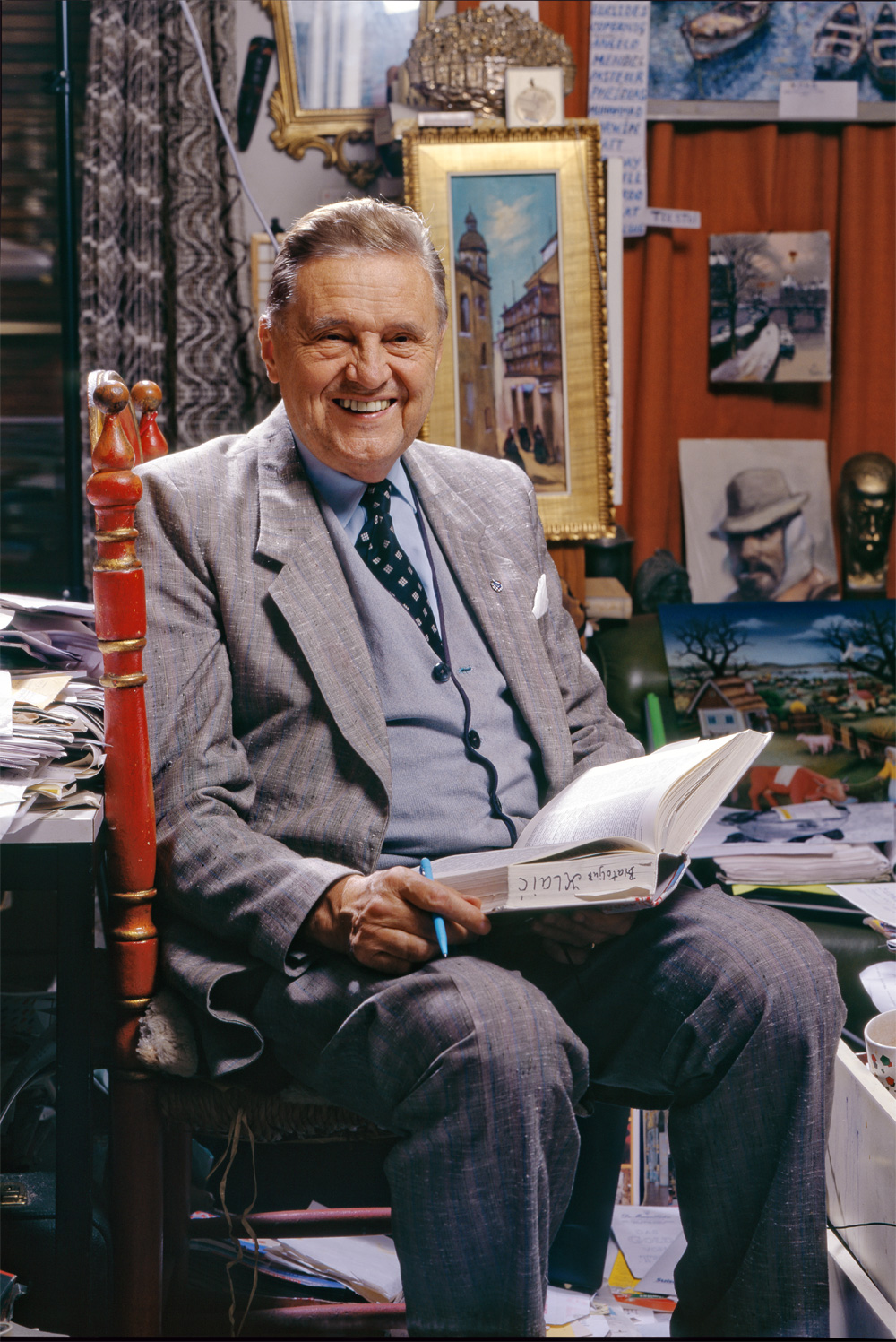 prof. dr. Žarko Dolinar u svom stanu u Baselu (Riehen), Švicarska.